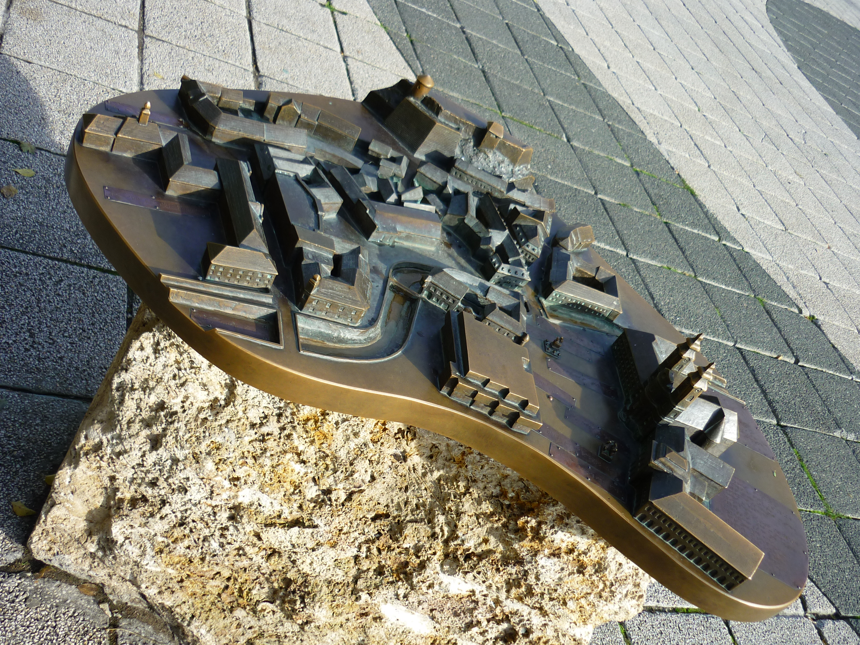 Farkas Ádám: Eger belvárosa (Dobó István tér)